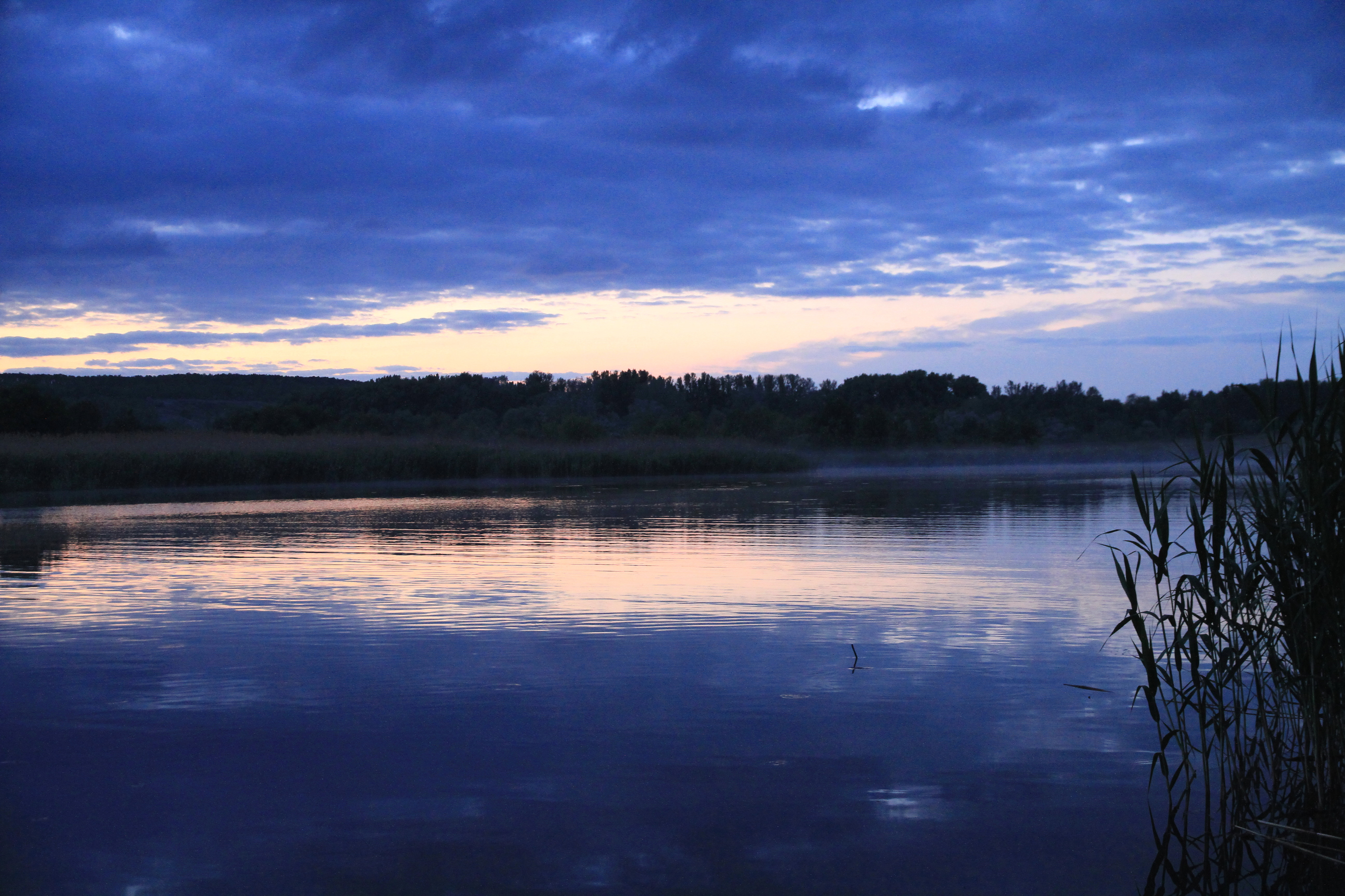 Холодный вечер